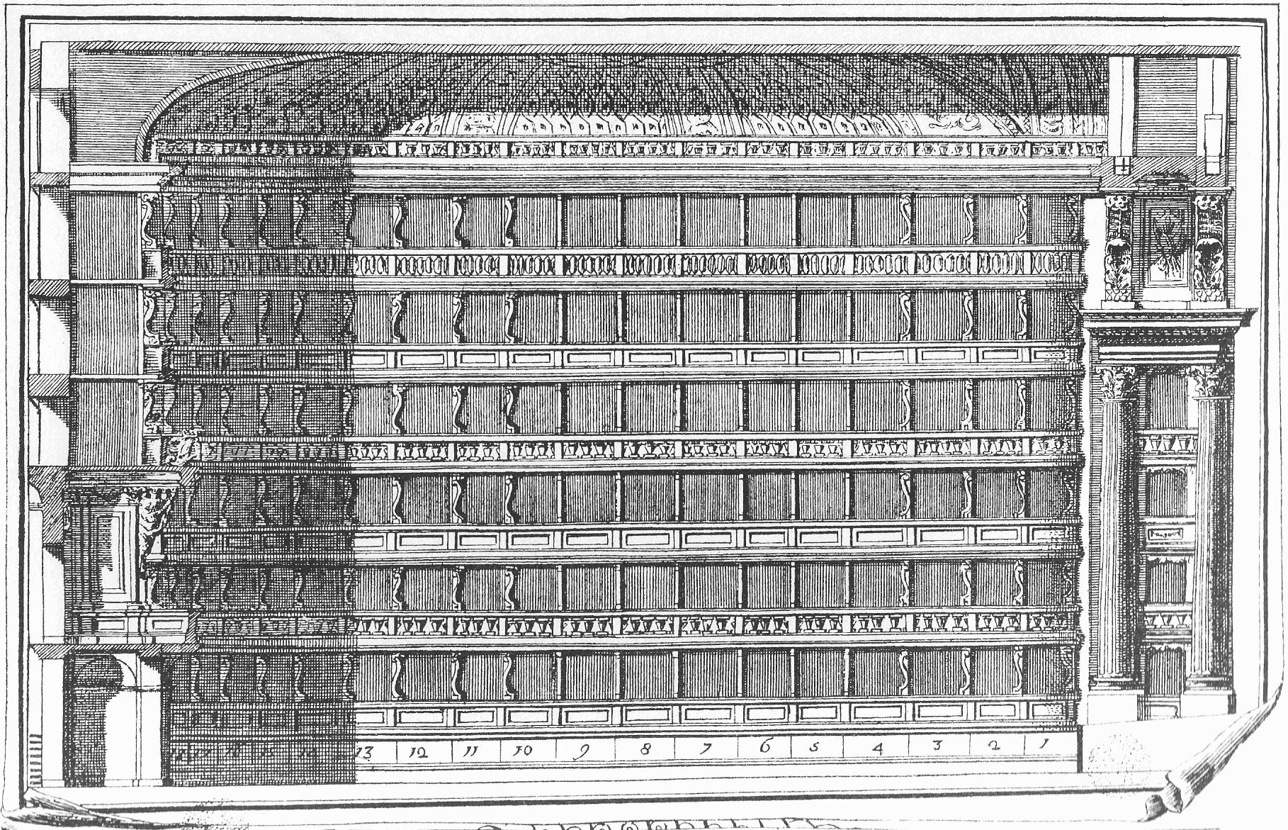 spaccato della sala del teatro alla Scala, incisione del 1789